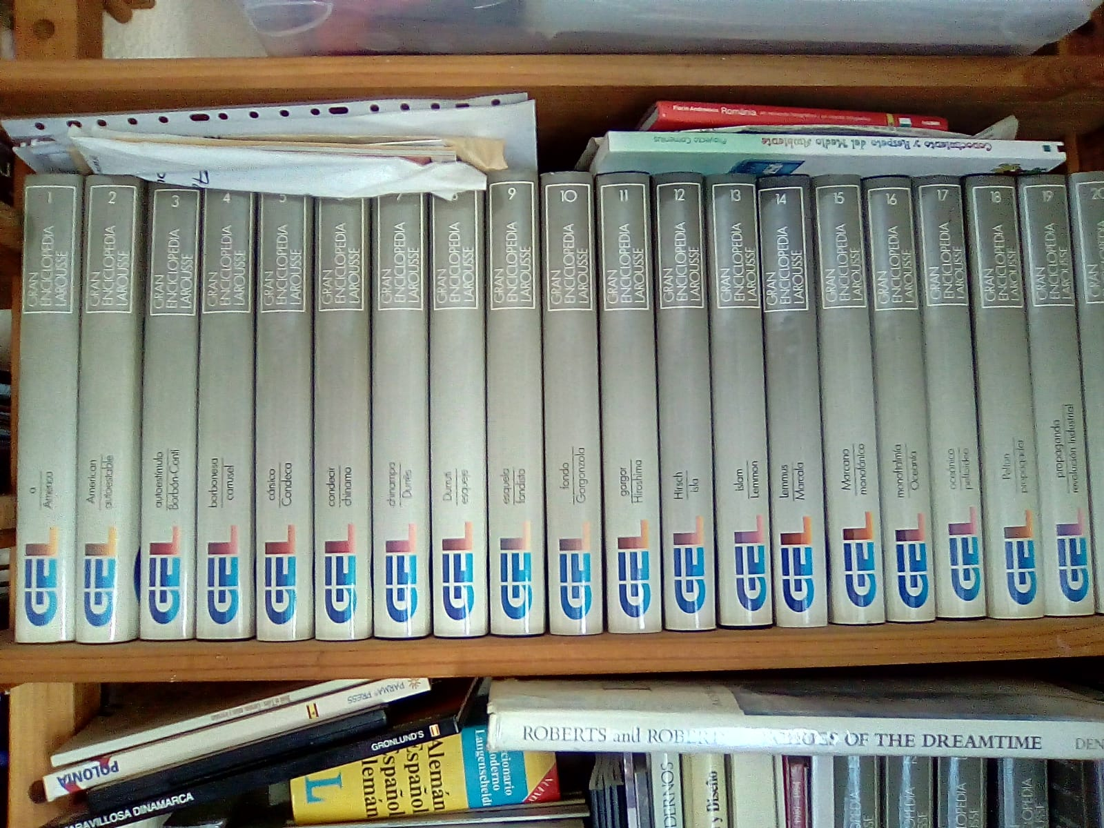 Hispanlingva enciklopedio Larousse